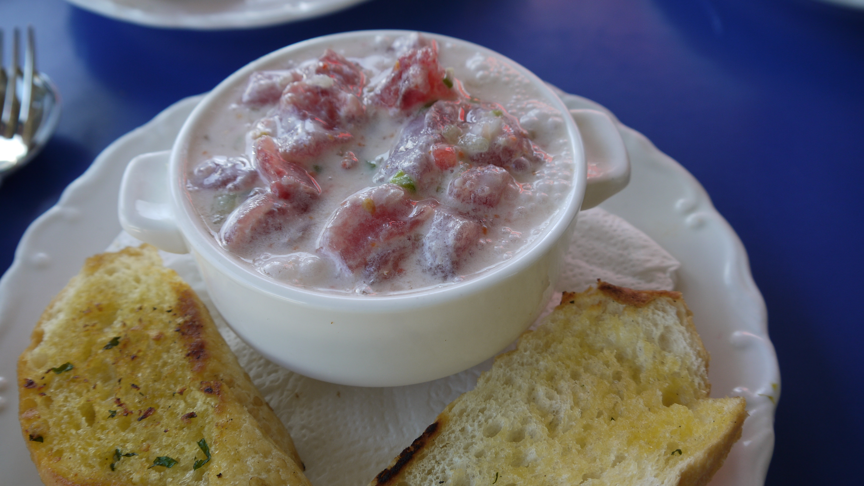 ota ika